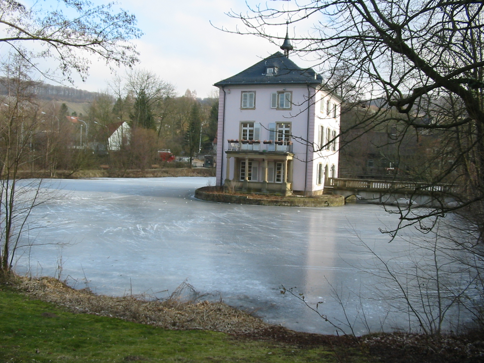 Trappenseeschlösschen bei zugefrorenem Trappensee.